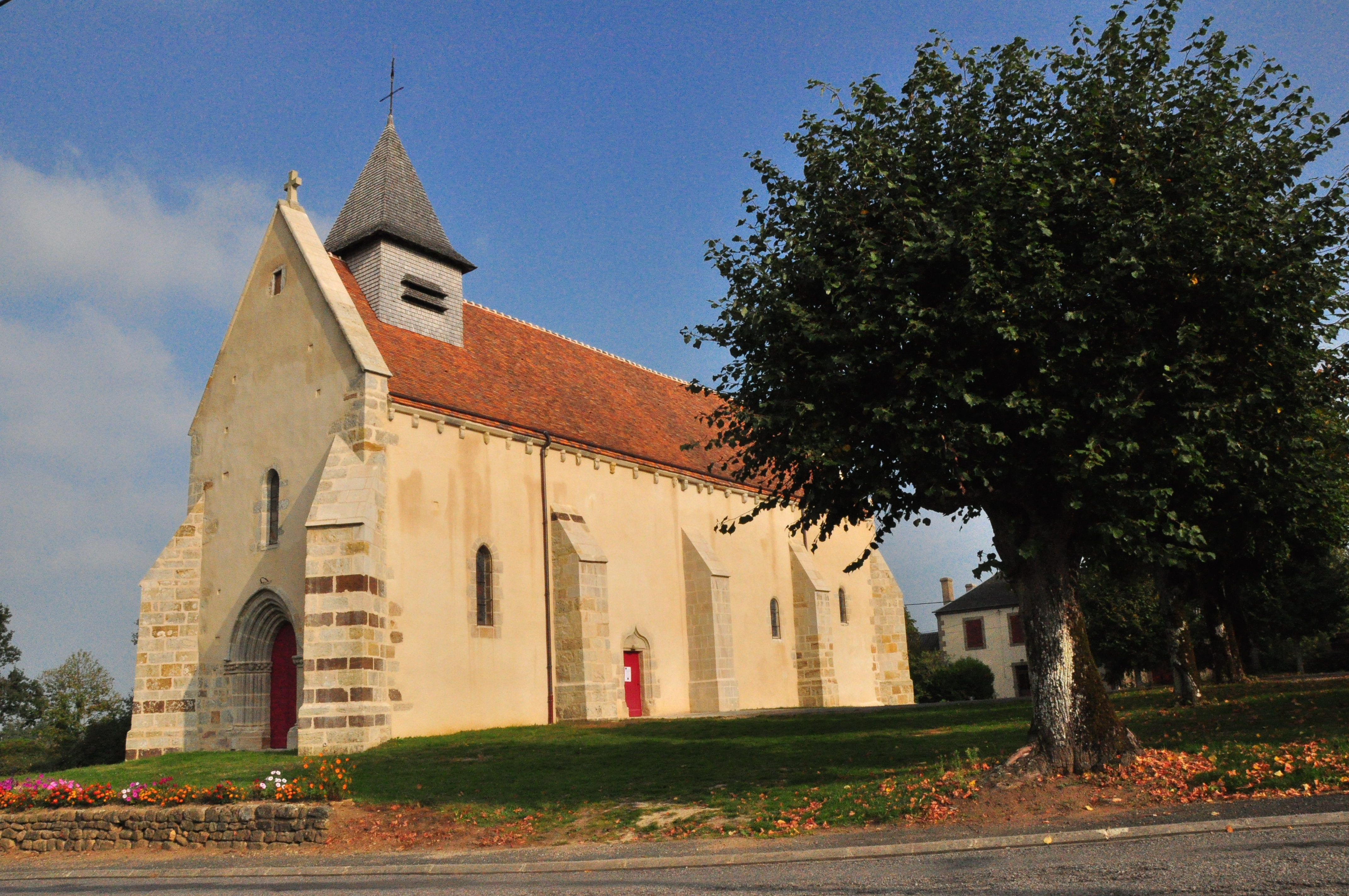 Eglise de Roussines (Indre)